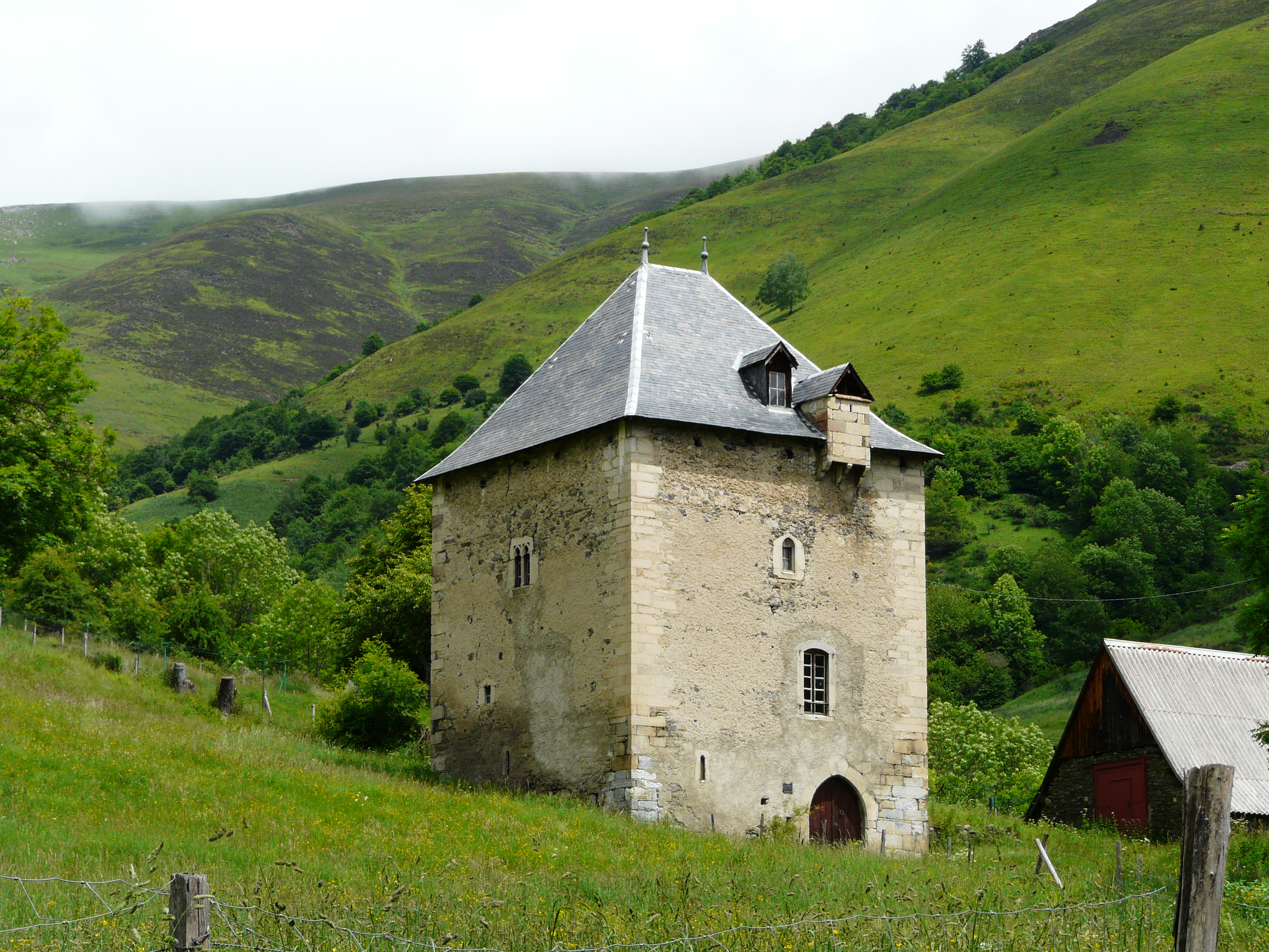 La tour de Mayrègne vue depuis le sud-ouest, Haute-Garonne, France.